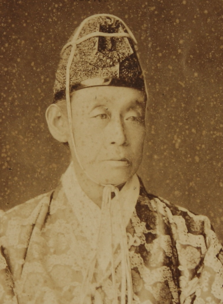 松平近説の肖像写真。